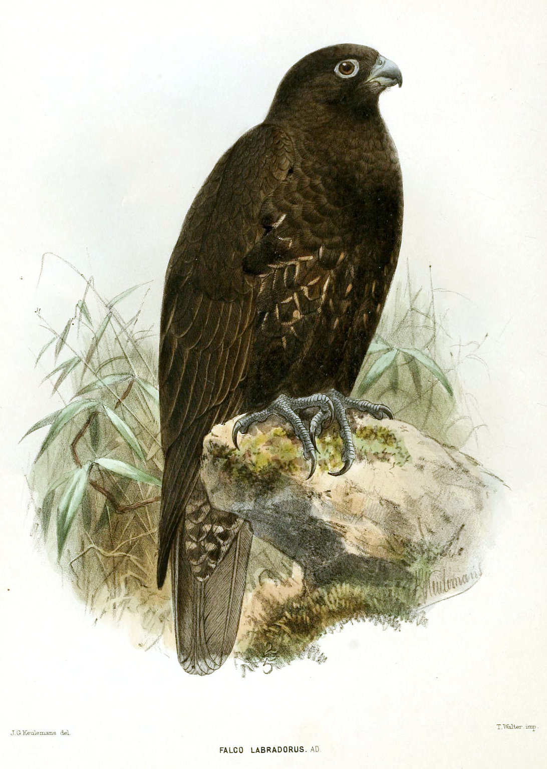 Falco labradorus = Falco rusticolus[1]